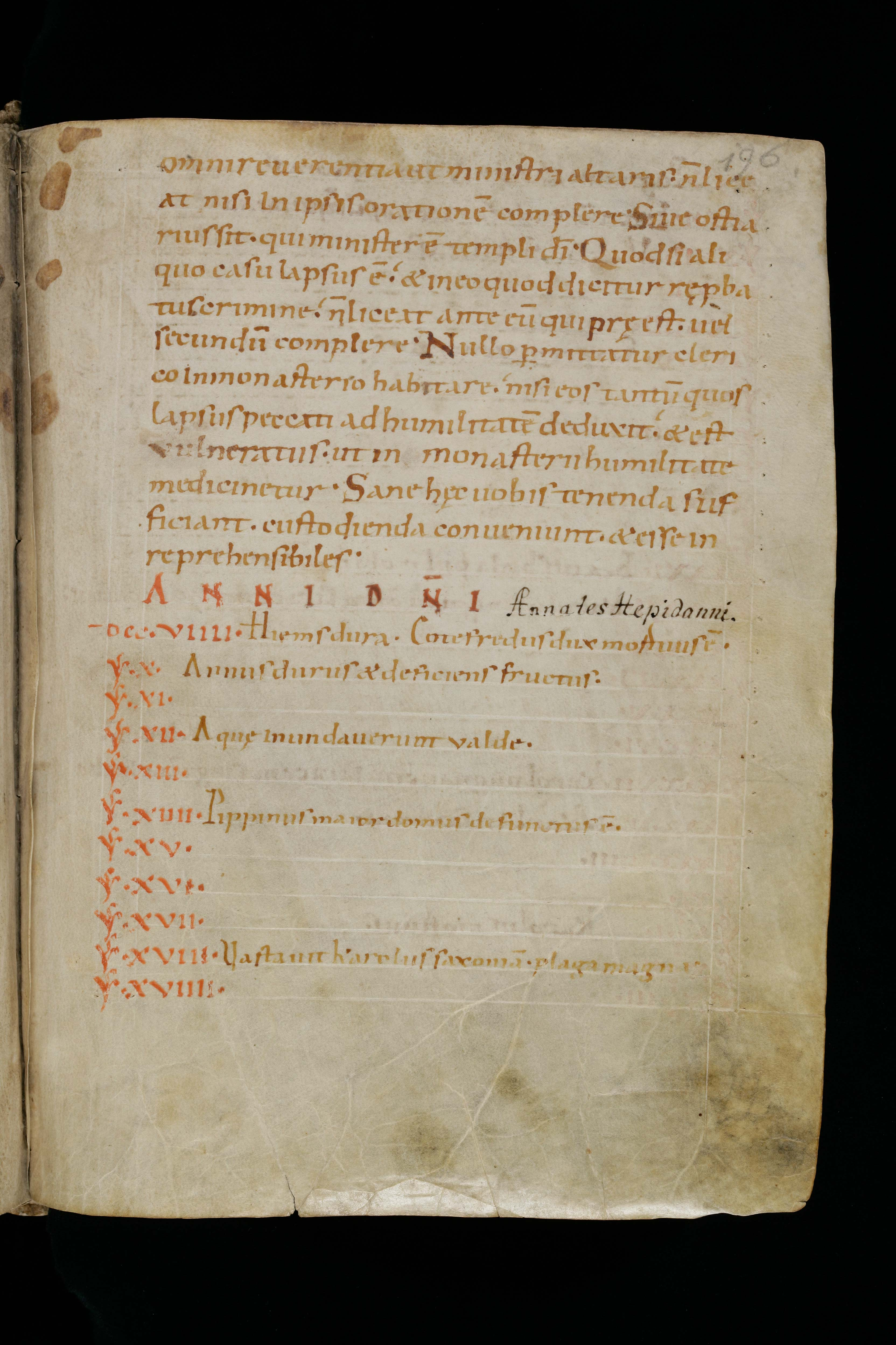 St. Gallen, Stiftsbibliothek, Cod. Sang. 915 Euw Anton von, Die St. Galler Buchkunst vom 8. bis zum Ende des 11. Jahrhunderts, Band I: Textband, St. Gallen 2008 (Monasterium Sancti Galli, Bd. 3), S. 354-355, Nr. 57. Handschriftentitel: Kapiteloffiziumsbuch Entstehungsort: St. Gallen Entstehungszeiten: Mitte d. 9. Jh., 10. Jh., 11. Jh.